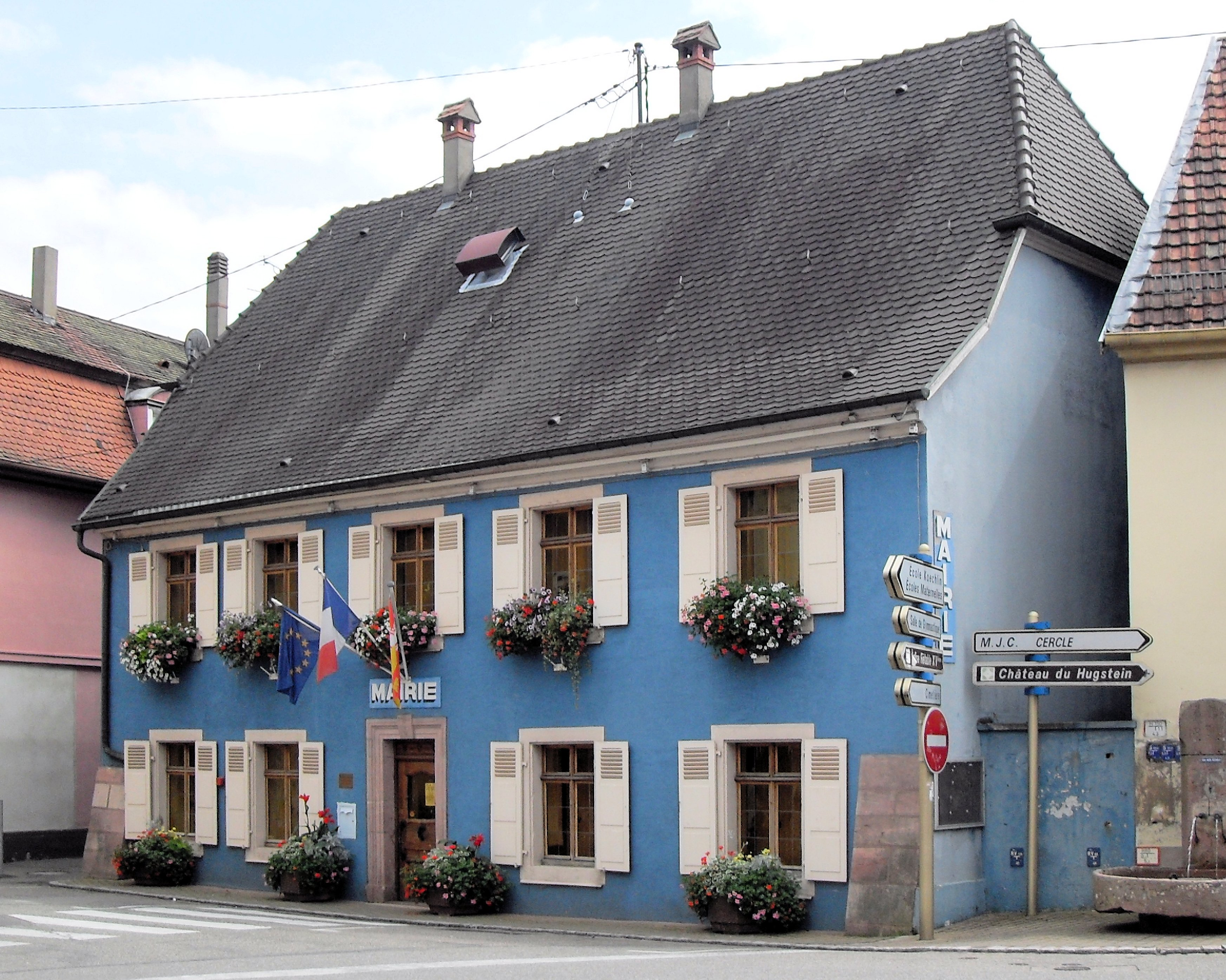 La mairie de Buhl